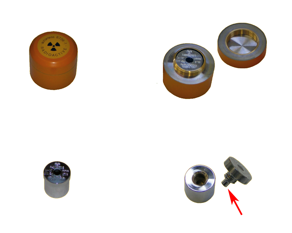 Caesium-137 Prüfstrahler in mehrfacher Verpackung